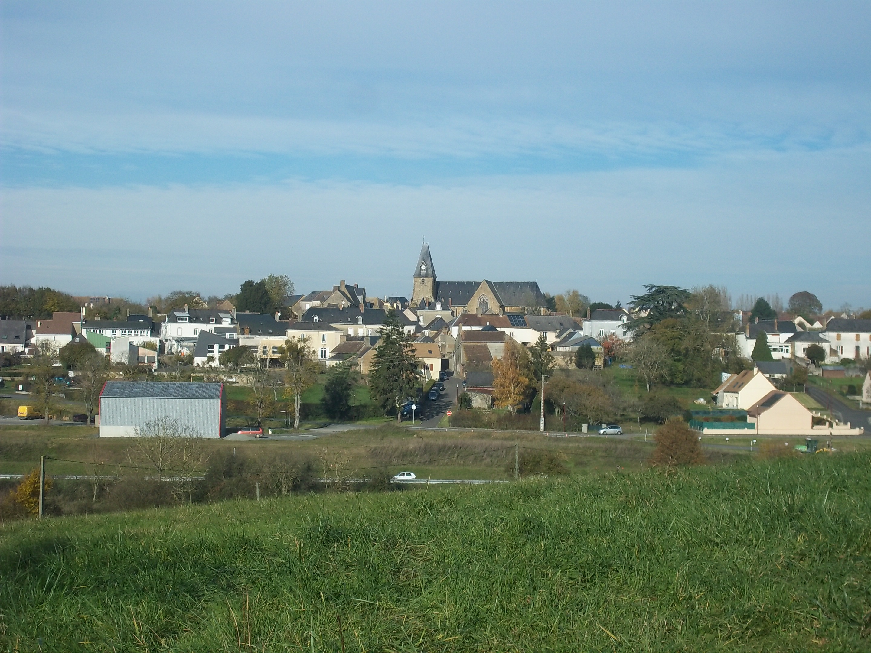 vue d'ensemble